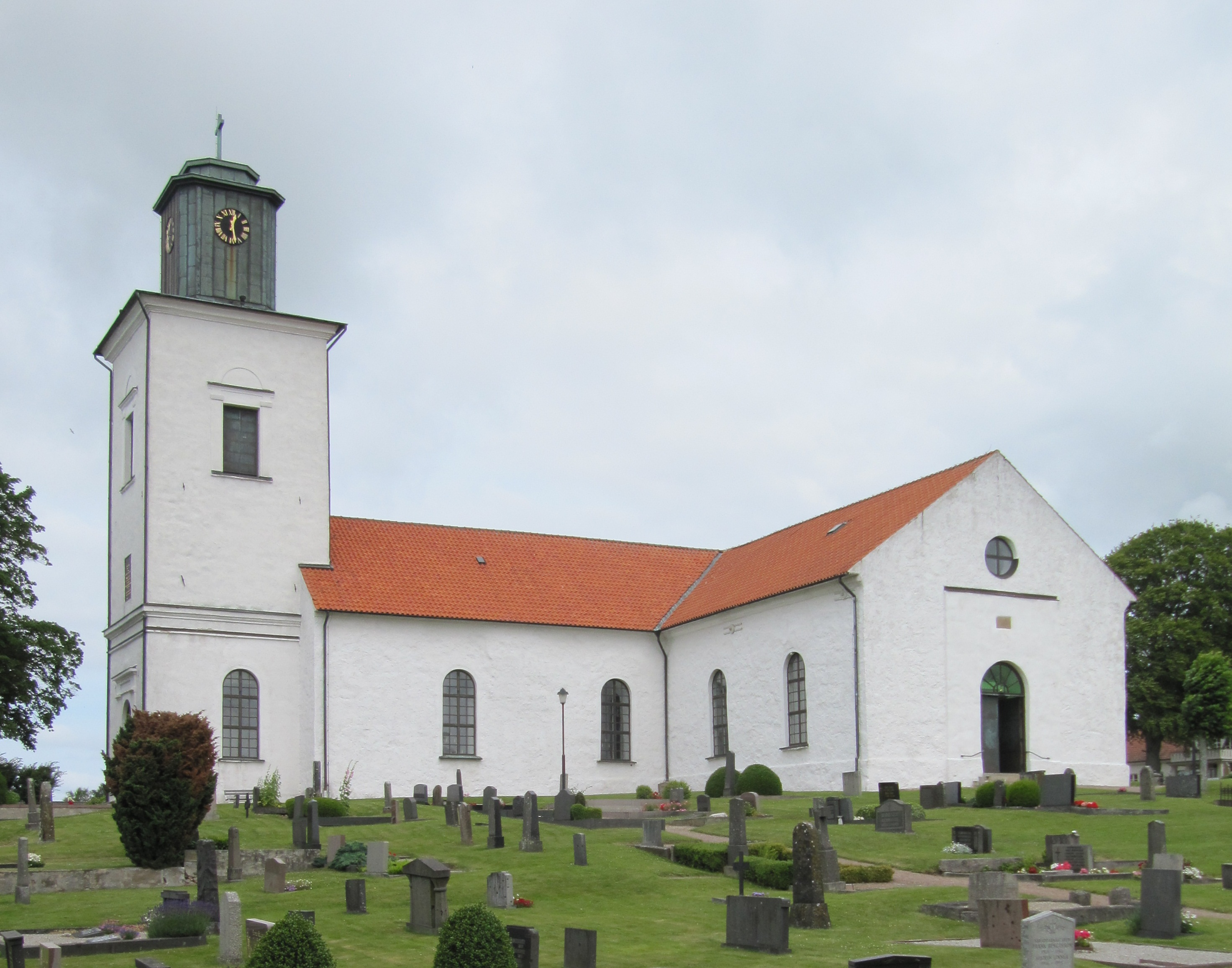 Västra Karups kyrka från sydväst